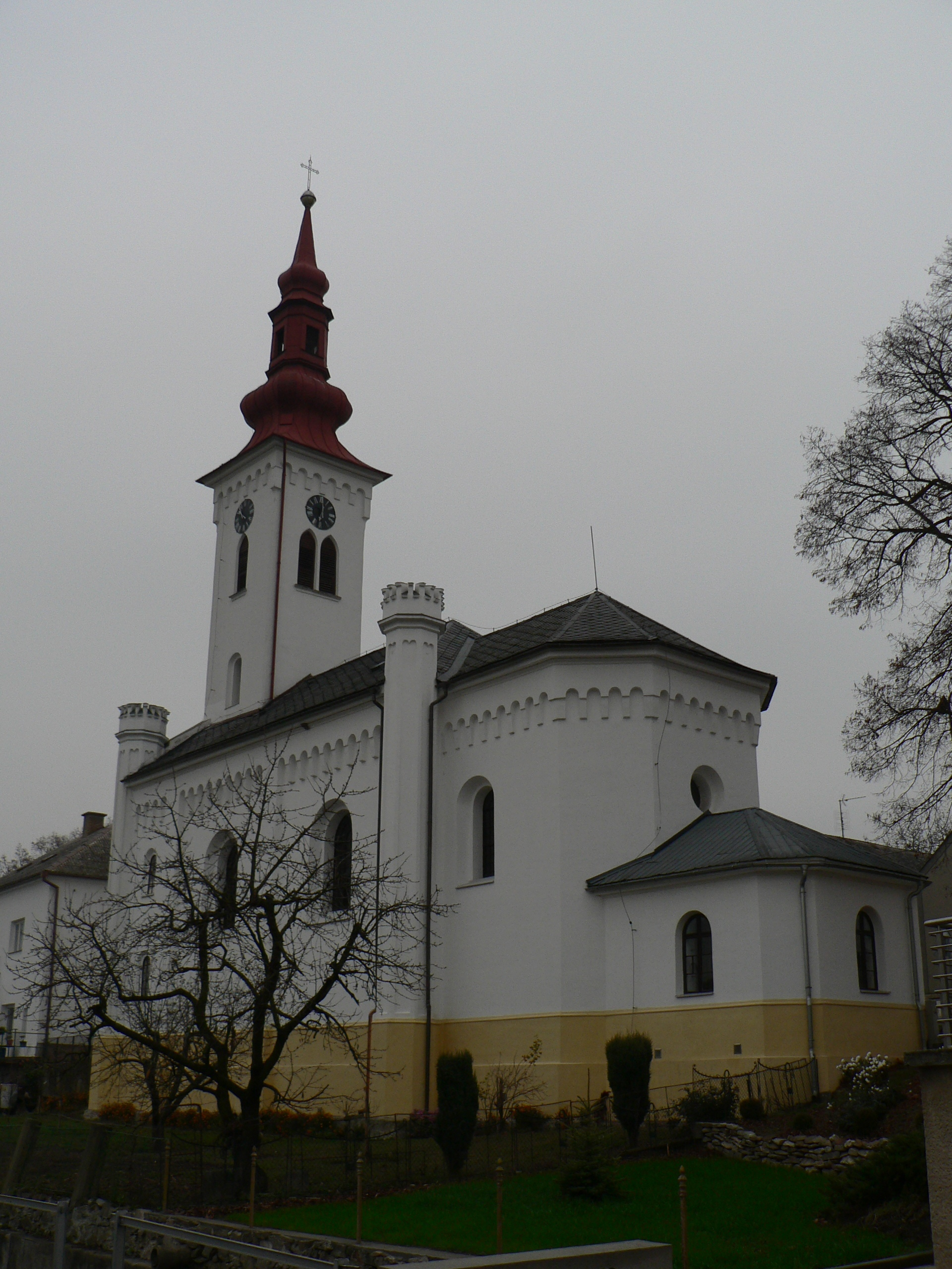 Kostel svatého Antonína Paduánského (Třeština)